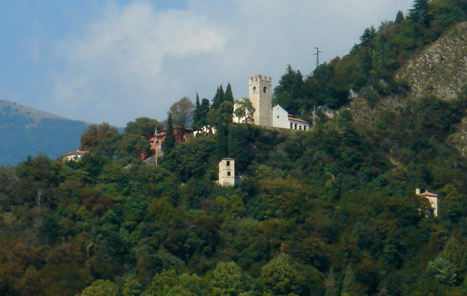 Serravalle (TV): Santuario di Santa Augusta, visto da Sant'Andrea di Bigonzo.